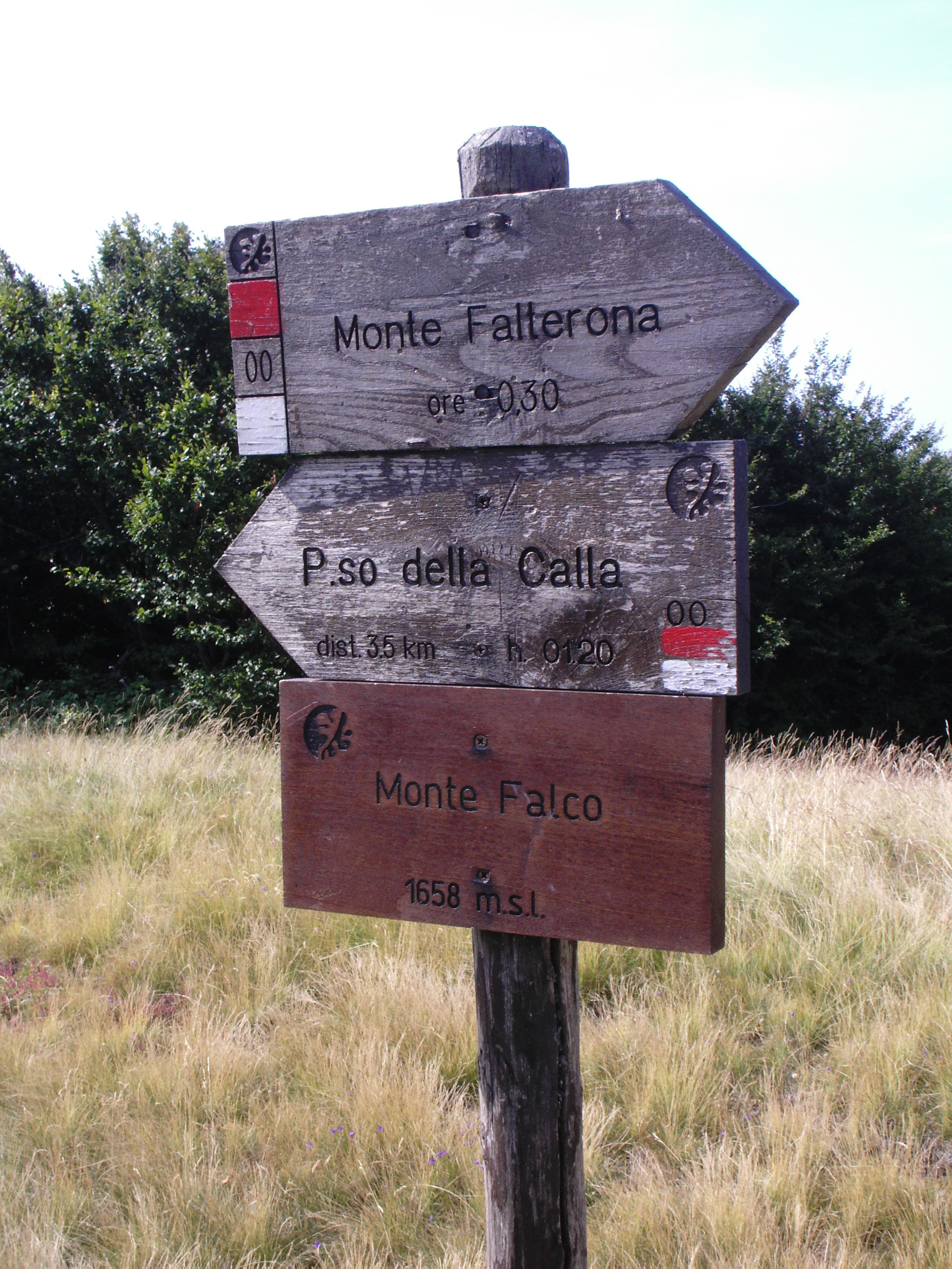 Monte Falco, cartello della vetta del Monte